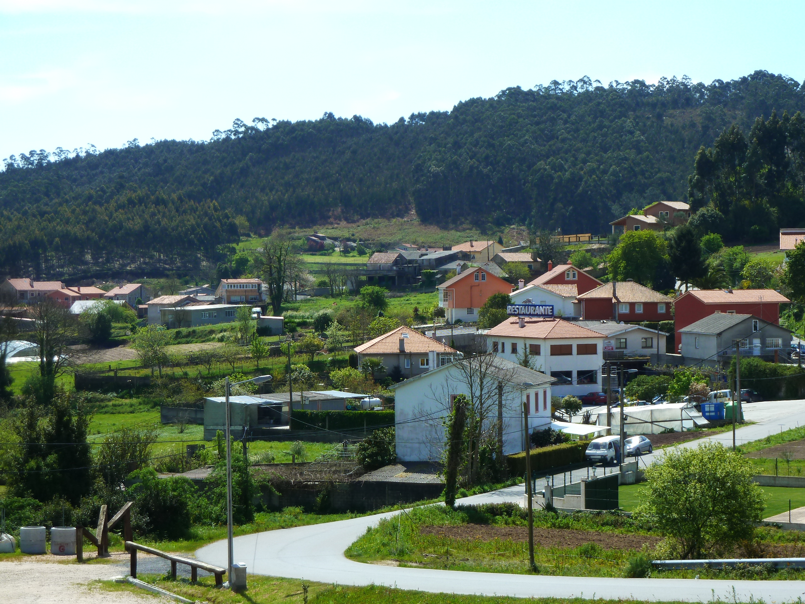 Vista parcial da parroquia de Orro en Culleredo.